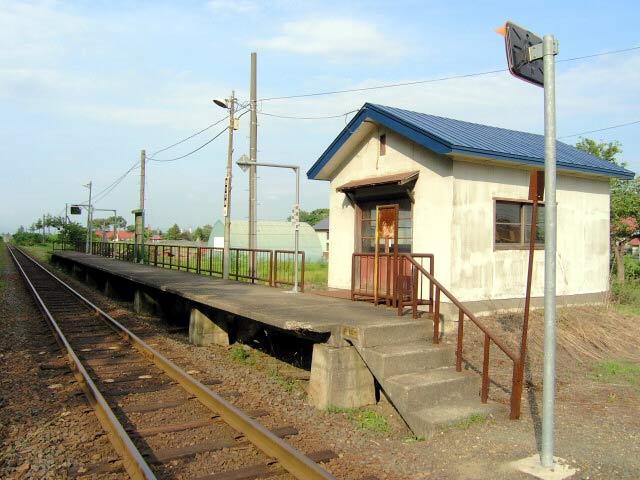 札的駅駅舎 撮影場所 札的駅近くの踏切より。 撮影者によるGFDLリリース